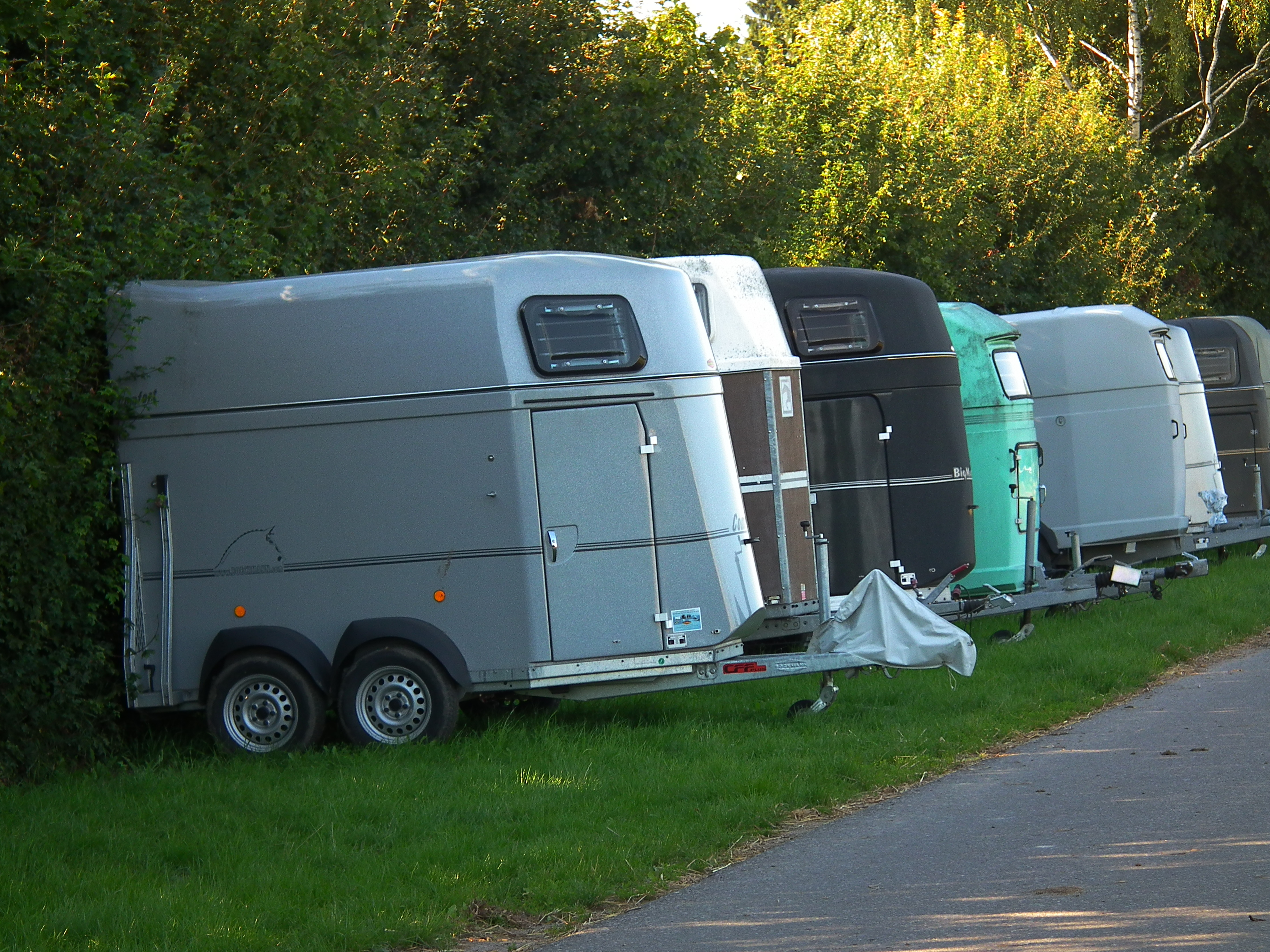 Pferdetransporter, fotografiert im nördlichen Baden-Württemberg, Deutschland